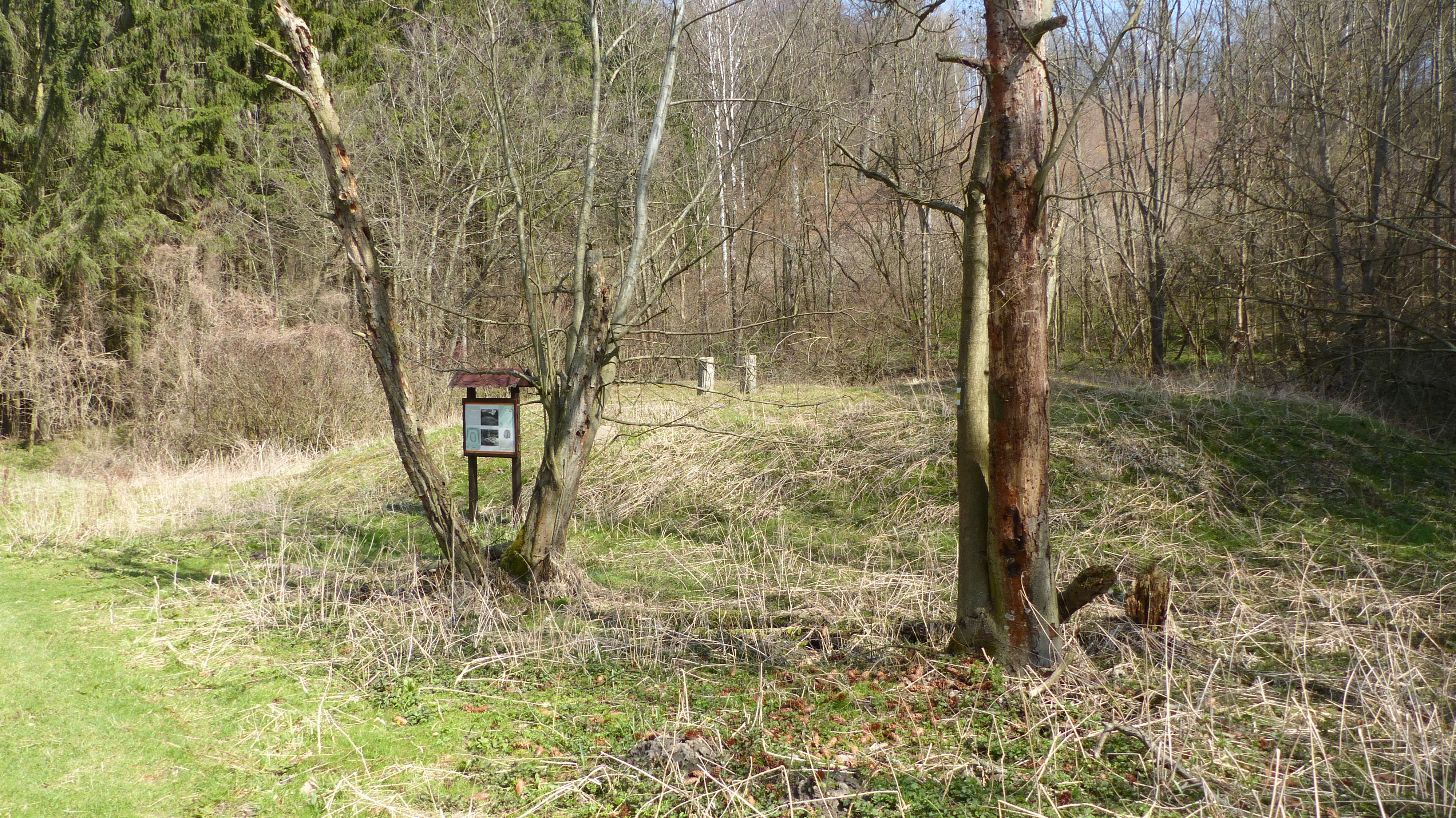 Umělý pahorek zvaný motte v zaniklé vsi Konůvky